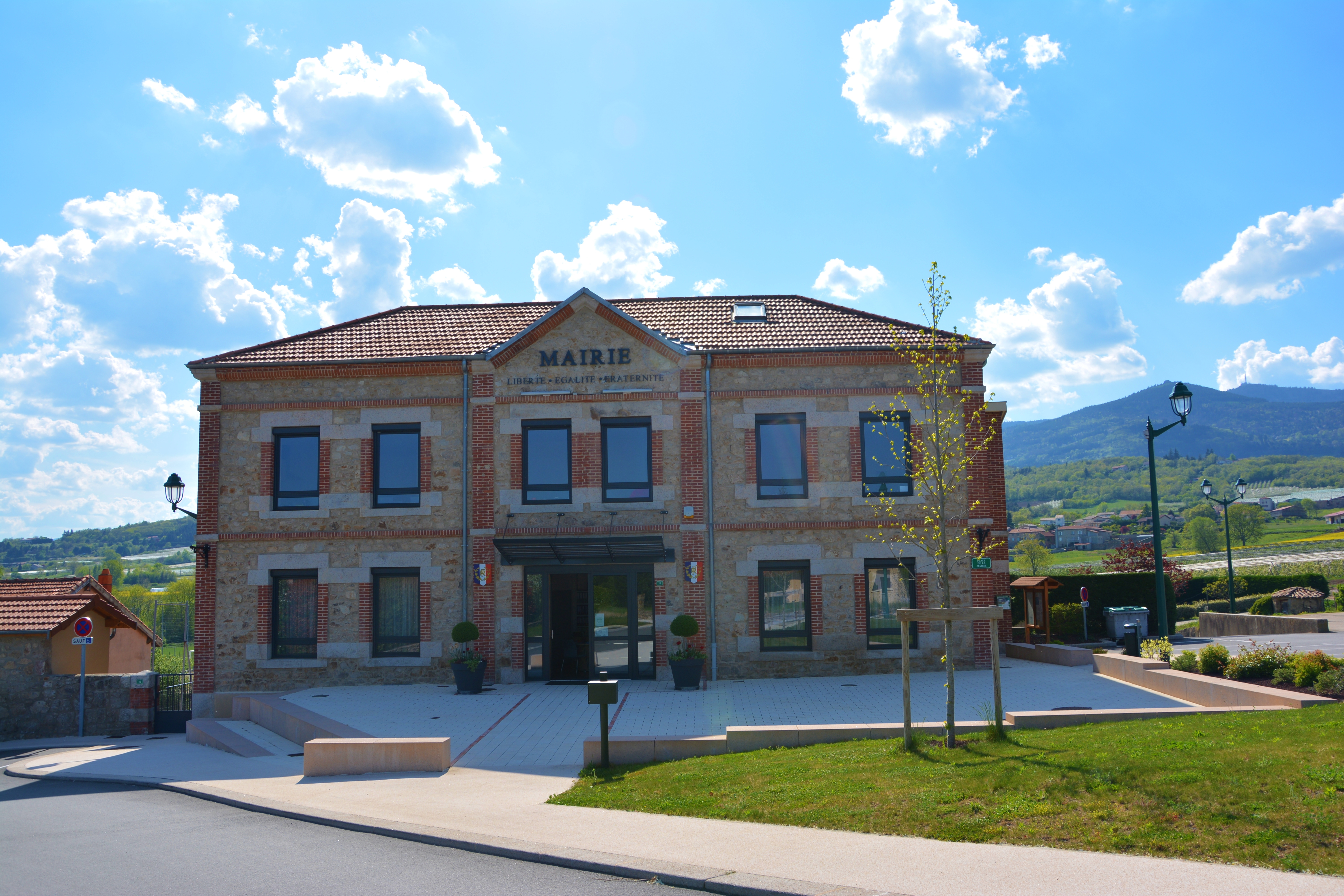 Mairie de Bessey - 23/04/2015.